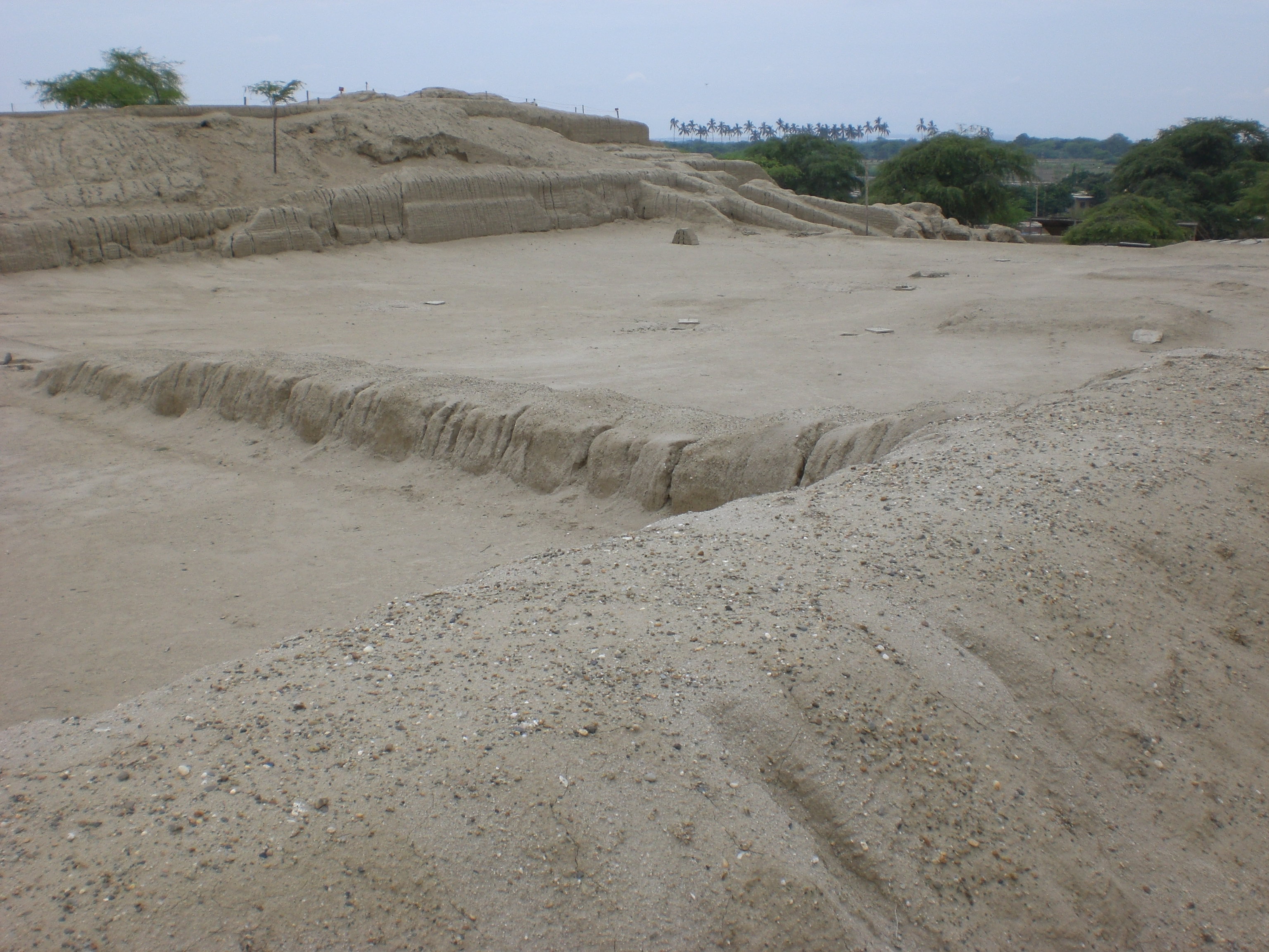 Narihualá (südlich von Piura / Catacaos)